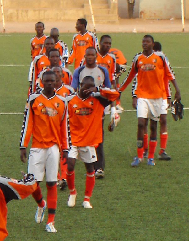 Burkina Faso: Mannschaft von RC Kadiogo Ouagadougou nach einem Spiel der Première Division gegen ASFA-Yennenga Ouagadougou im Stade Municipal